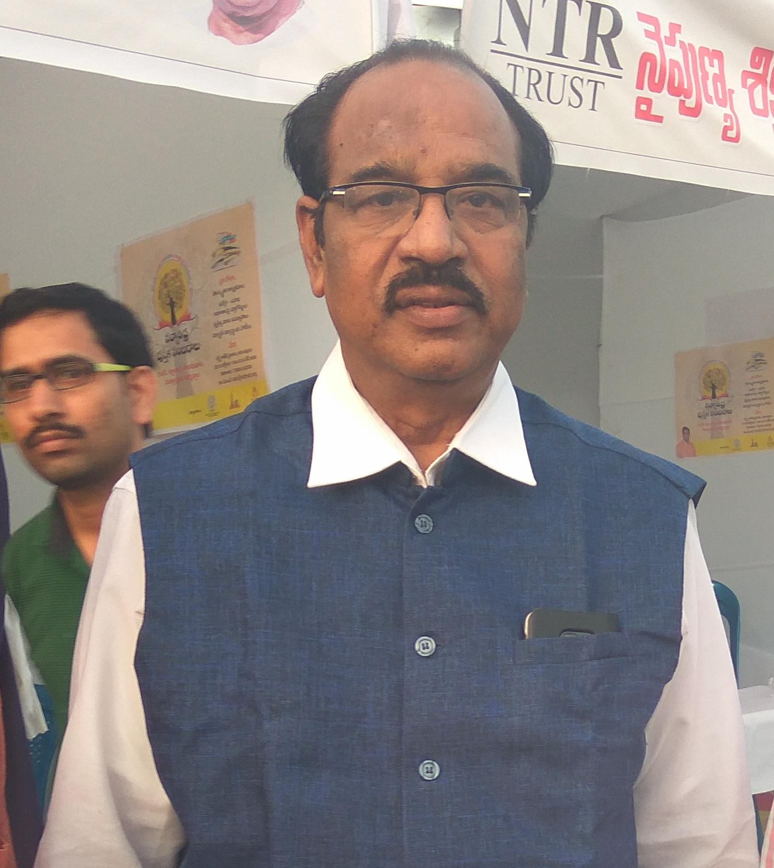 బి.వి.పట్టాభిరామ్